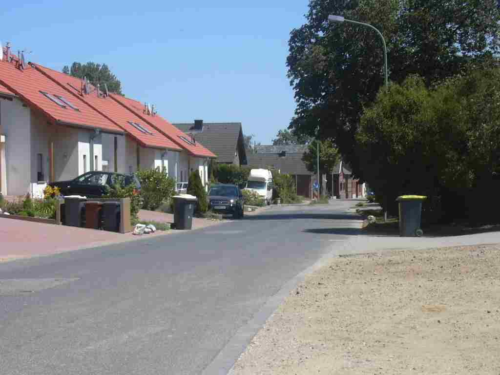 Lüxheim, Nikolausstraße Own Work papa1234 2006-07-14